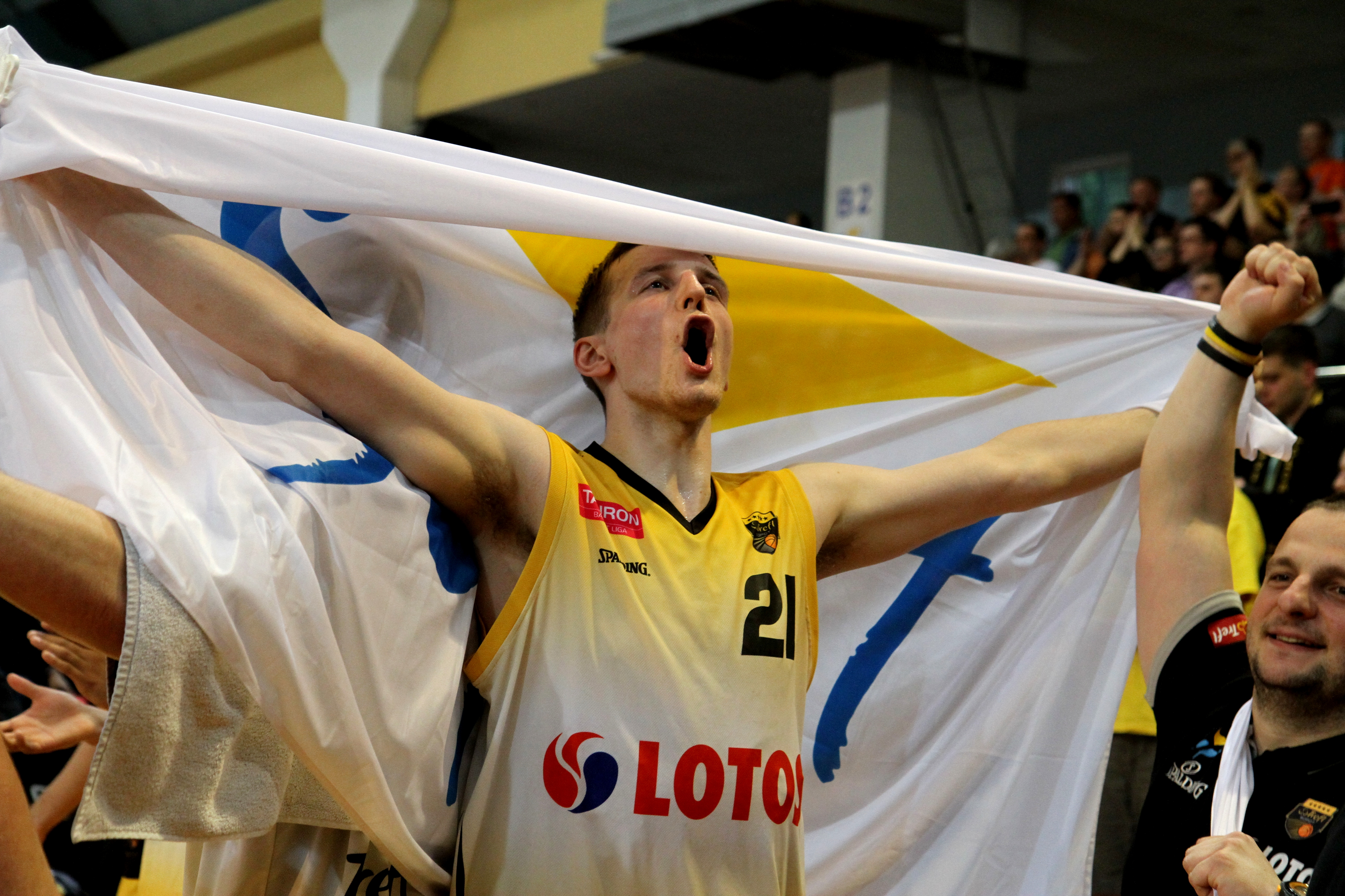 Adam Waczyński Trefl Sopot brązowy medal Tauron Basket Liga